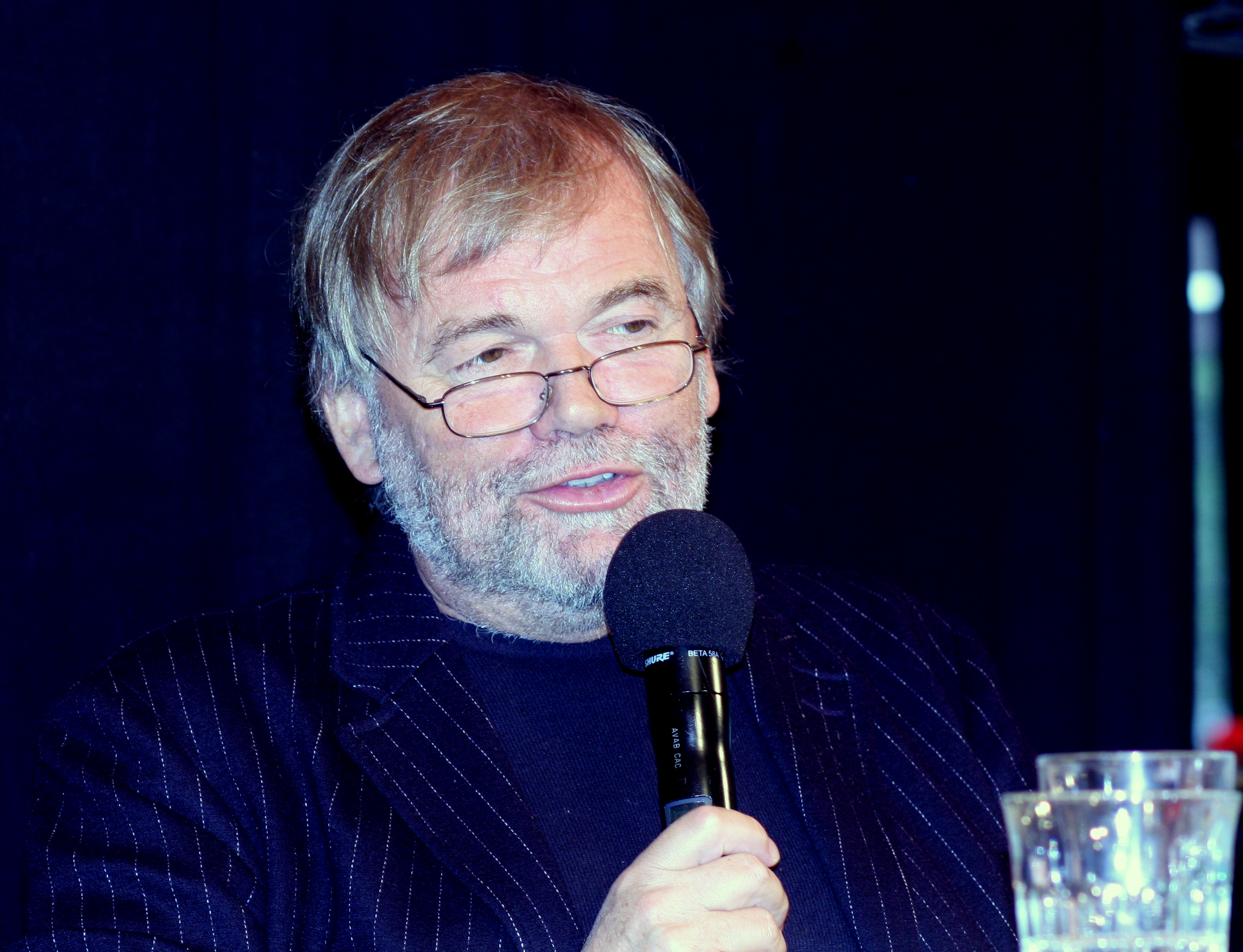 Jostein Gaarder, norsk forfatter